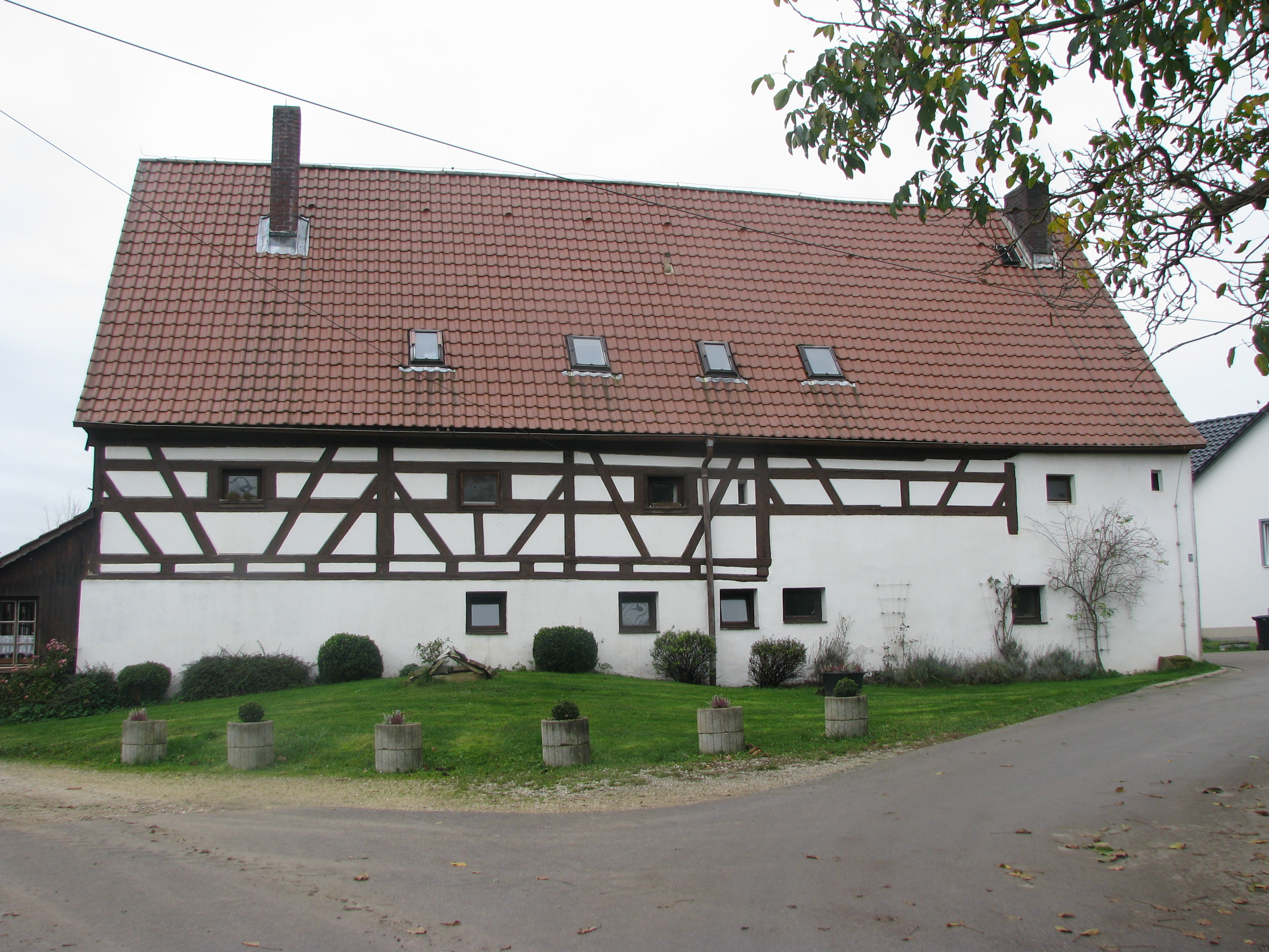 Reichenholz, Ortsteil der Gemeinde Berg bei Neumarkt in der Oberpfalz, Wohnstallhaus mit Fachwerk-Obergeschoss